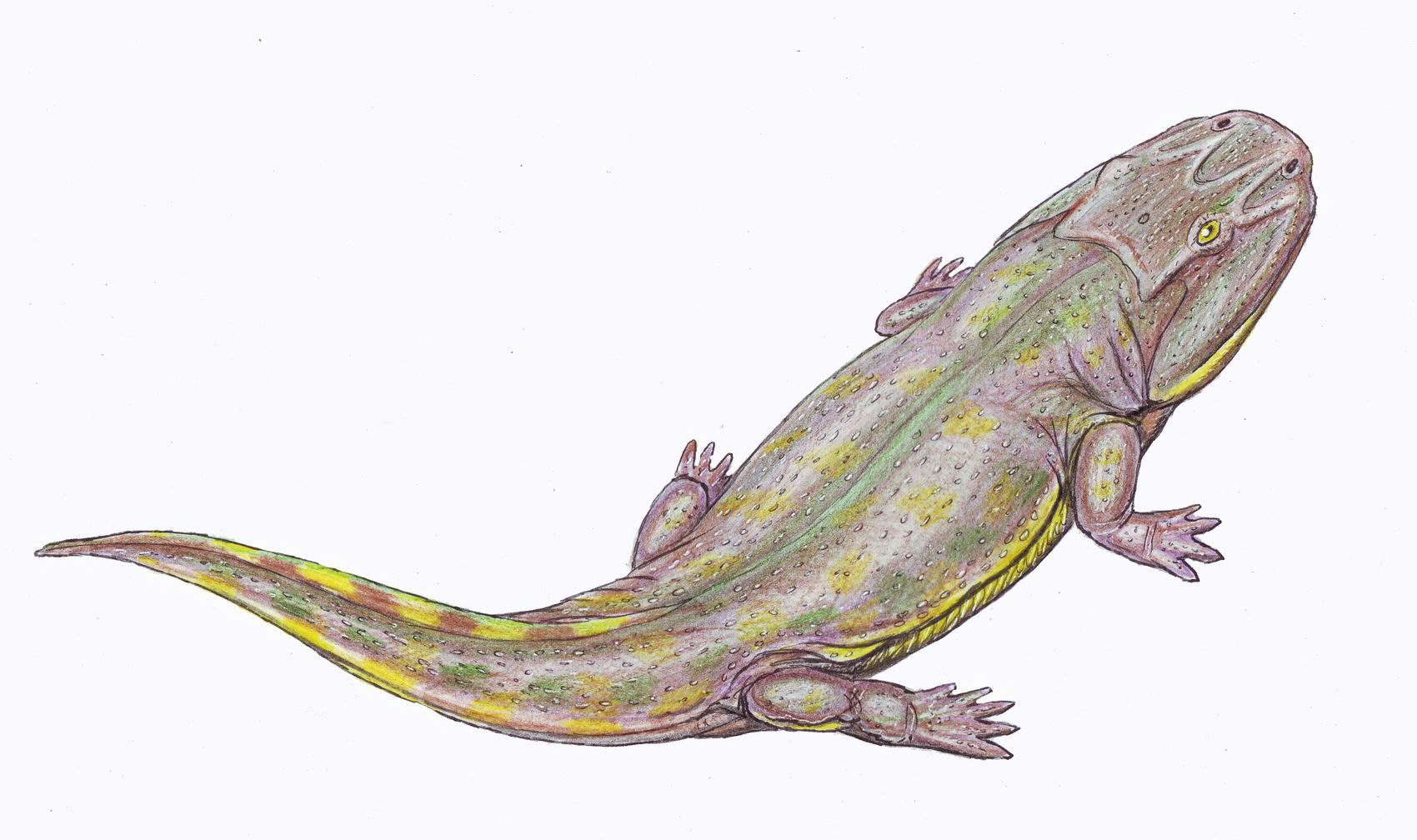 Clamorosaurus nocturnis